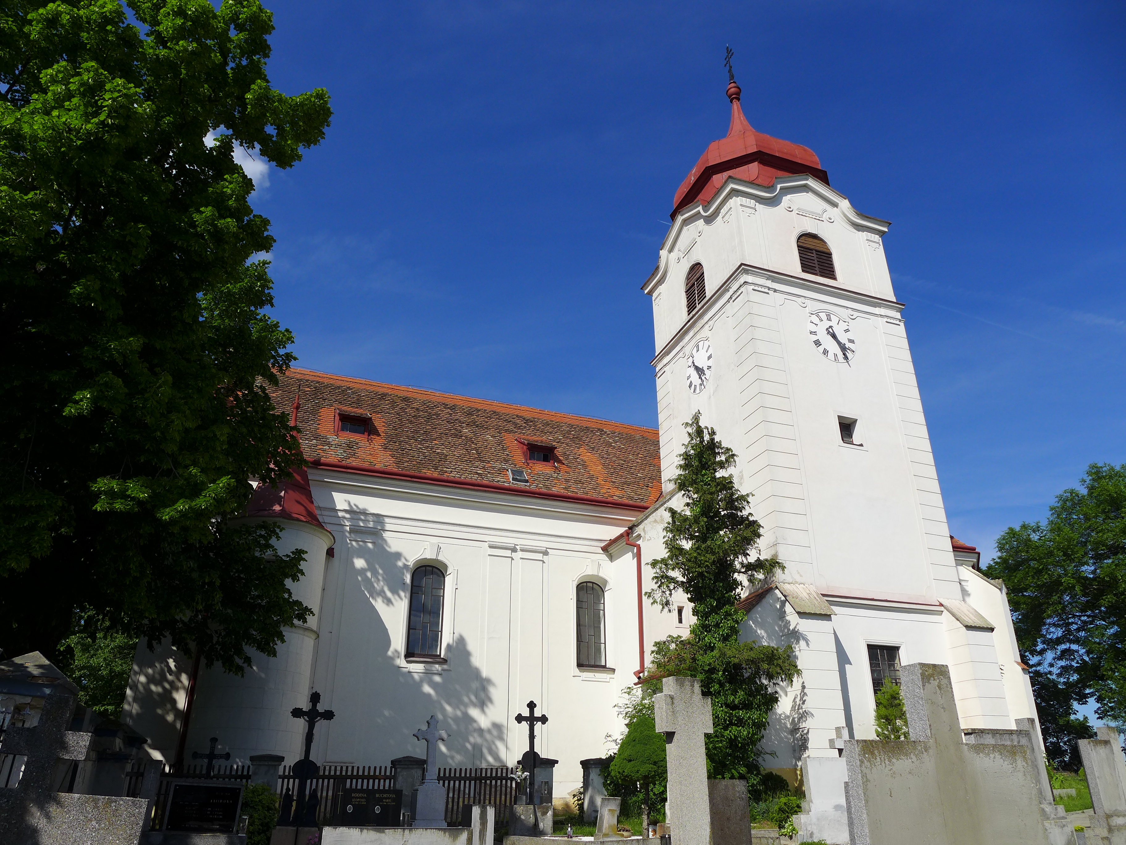 Kostel Povýšení svatého Kříže, okraj obce, Trstěnice (okres Znojmo).